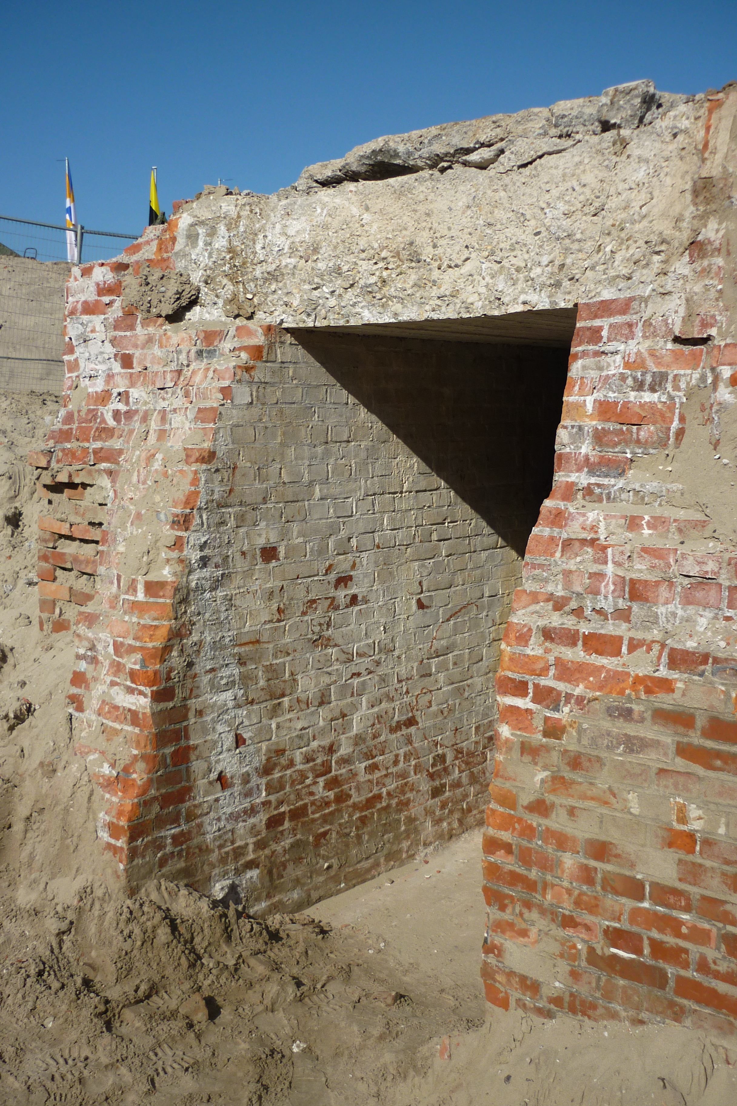 Scheveningen: ondergrondse toegang tot S3-kazemat bij Seinpostduin, ontdekt in 2010